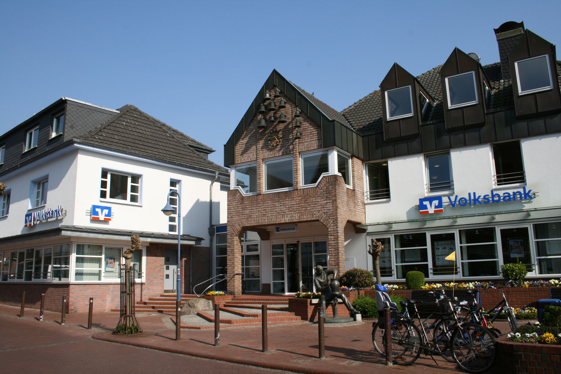 Hauptstelle der Volksbank Schermbeck, Mittelstraße 54